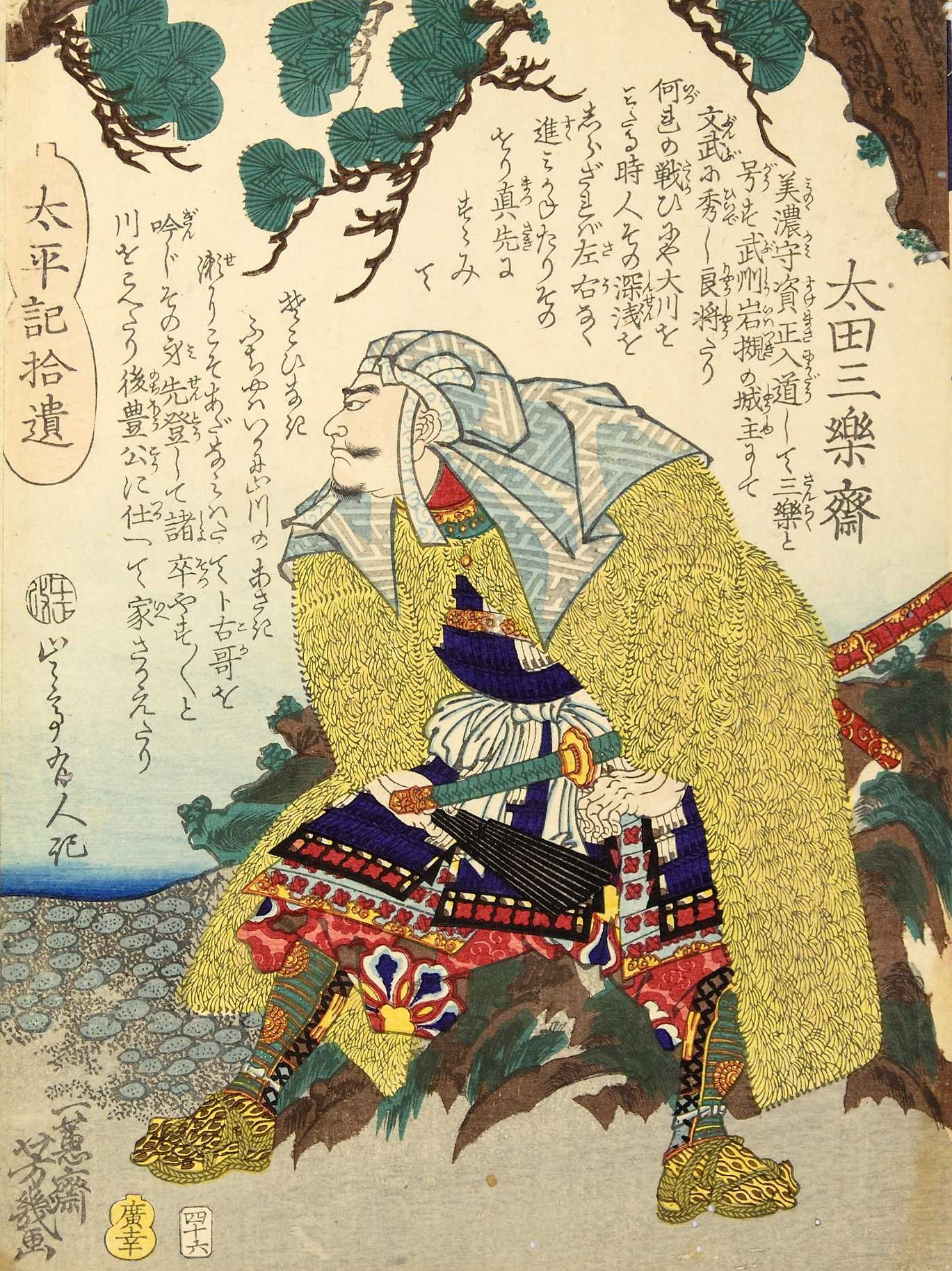 「 太平記拾遺四十六:太田三楽齋」